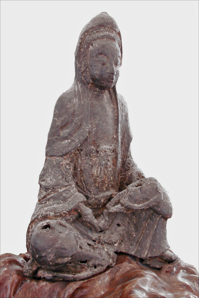 Guanyin avec un enfant dans les bras, Chine (?), XVe siècle (?), bronze et fer, ancienne Collection Auguste Rodin (1840-1917), Antiques, 1916, Donation Rodin, Co. 113, Paris, musée Rodin.